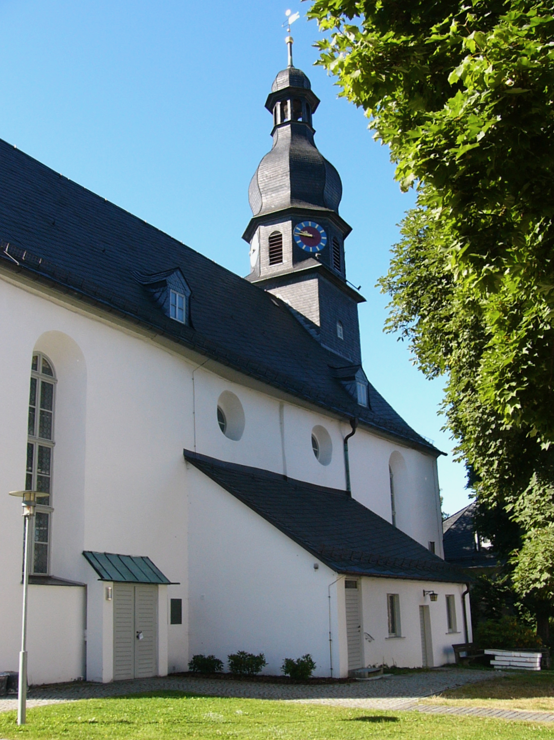 Ortsansicht Selbitz